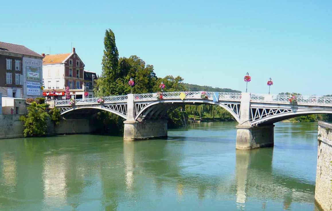 Pont sur la Marne, La Ferté-sous-Jouarre aux confins de la Brie et de la Champagne, France